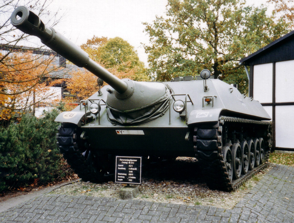 Jagdpanzer Kanone 90 mm (Prototyp), Fahrwerk von Henschel produziert (6 Laufrollen - Serie hatte 5)